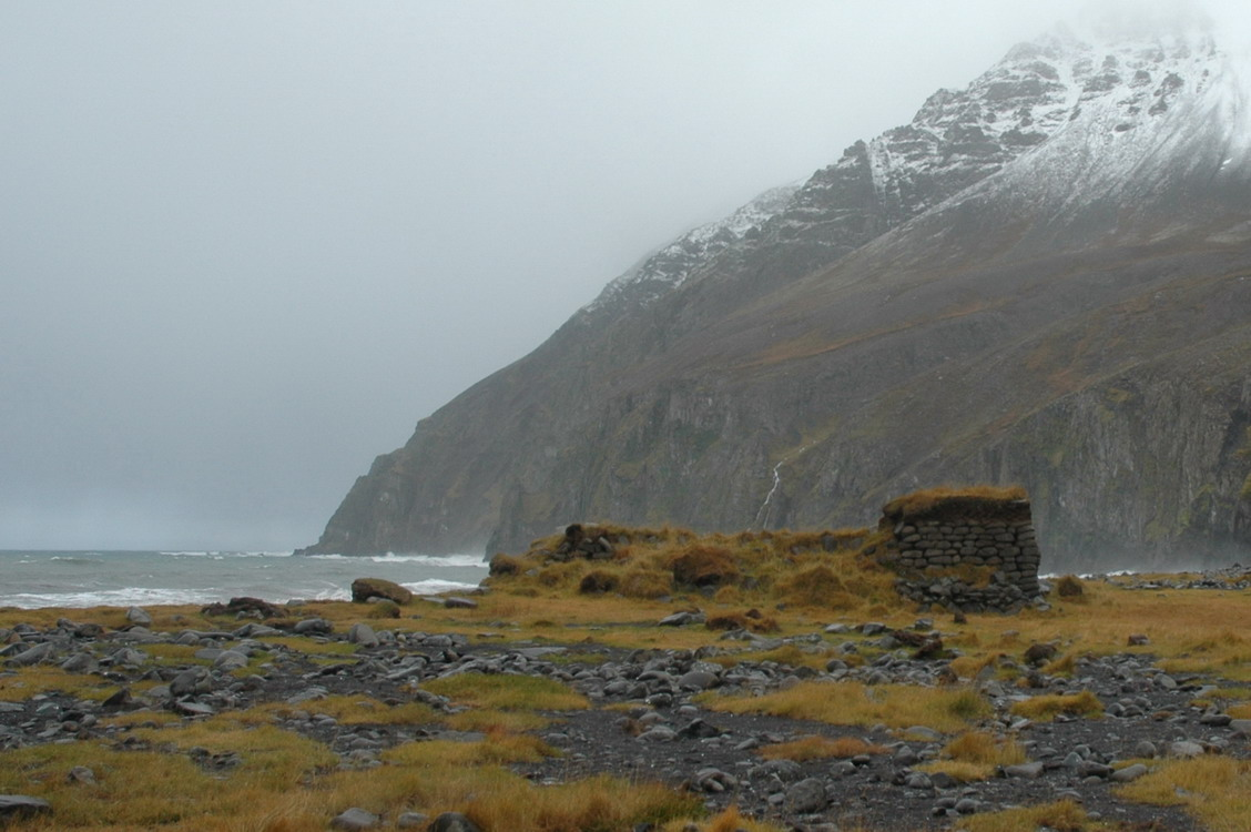 Knarrareyri 8. okt 2005 - þessi mynd er tekin af mér (is:notandi:oliagust)